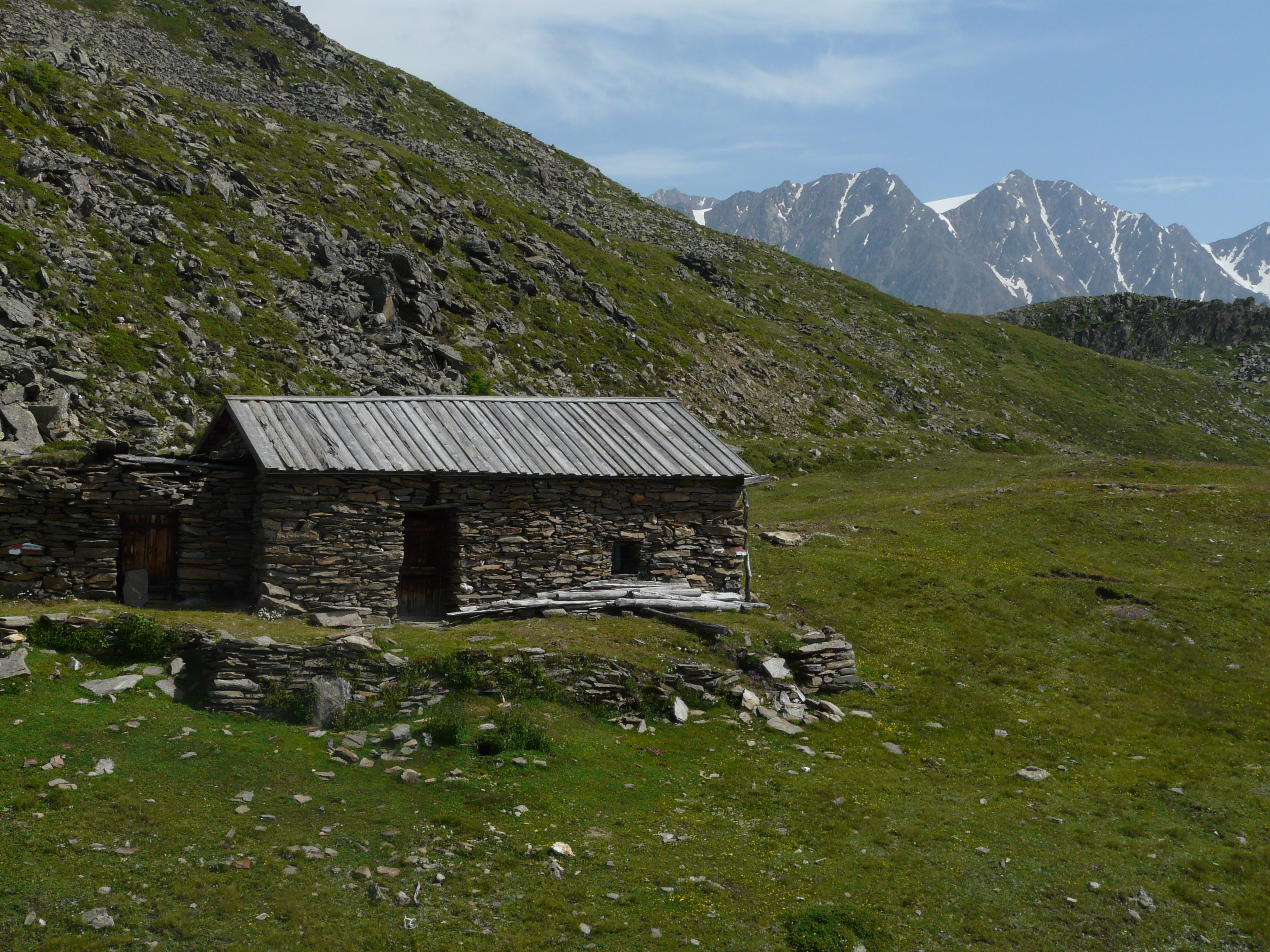 Zum Klammwaal gehörende Waalerhütte (2377 m) auf dem Atzboden zwischen Unser Frau und Pfossental